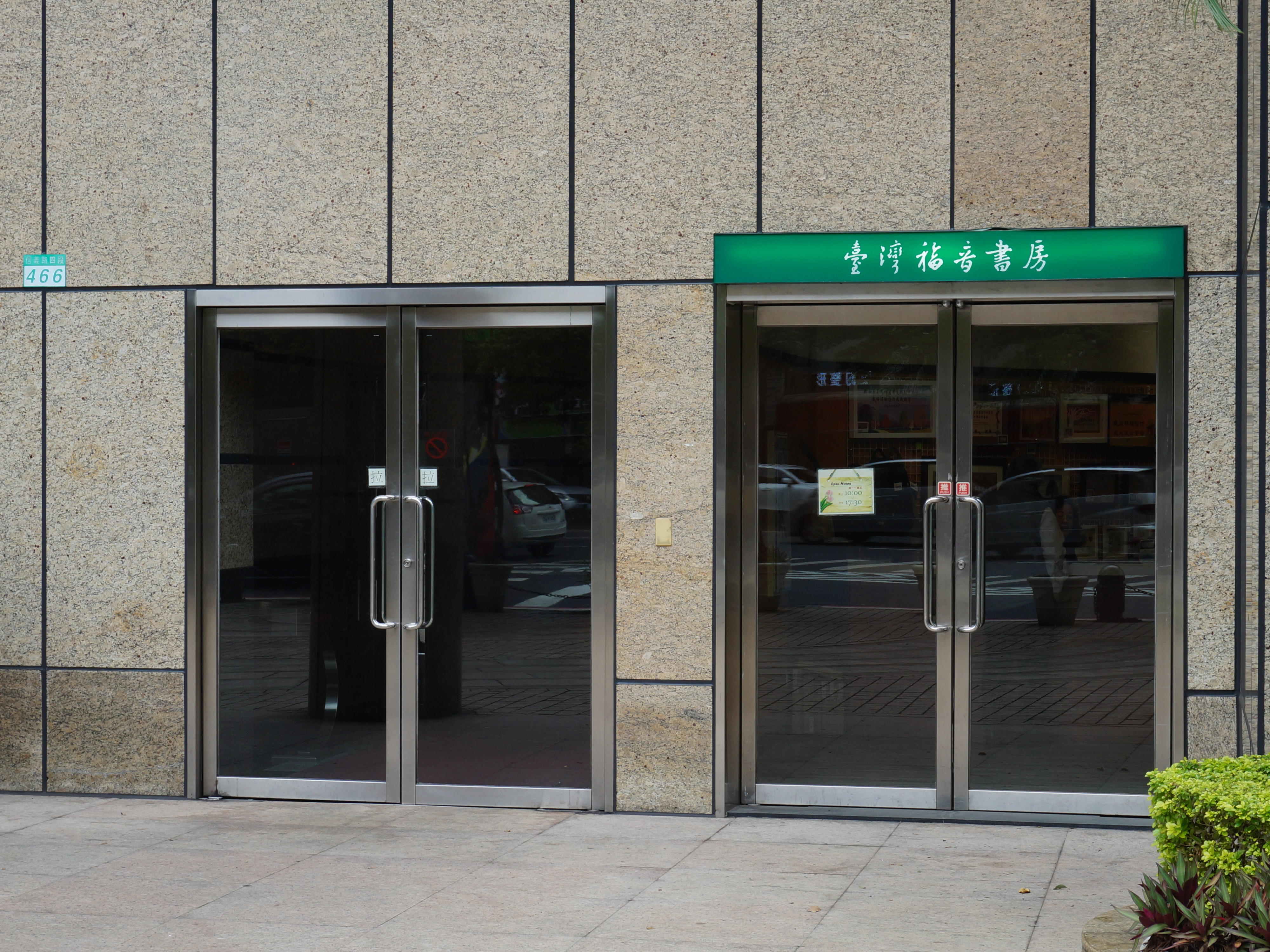 信基大樓側門，面向臺北市信義區基隆路二段。